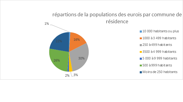 Répartions exacte en pourcentage de la population de l'eure par commune de résidence emanent d'enquete de population effectuer par l'ISEE est disponible sur leur site internet